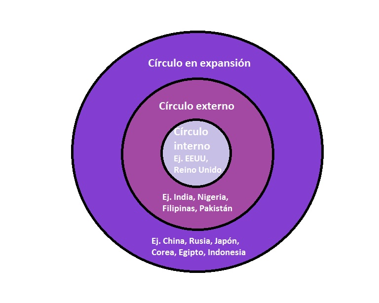 Teoría de los círculos concéntricos de Braj Kachru